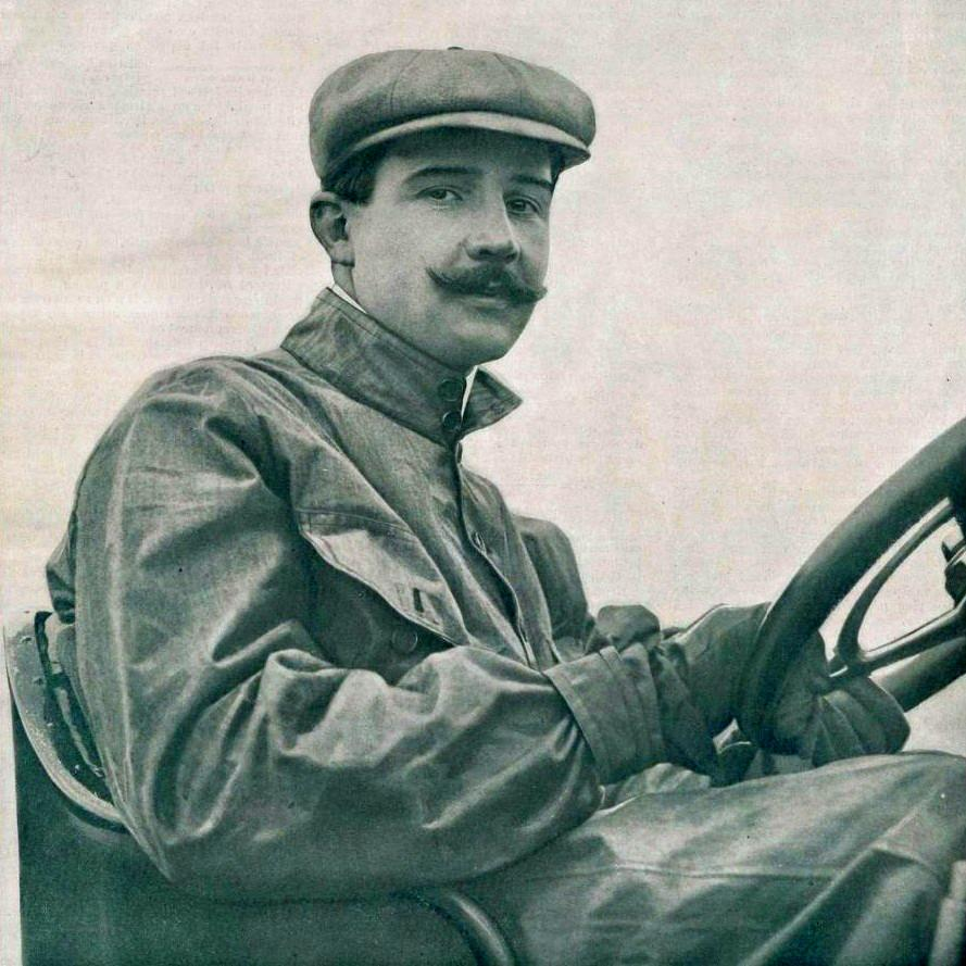 Felice Nazzaro, vainqueur du Grand Prix de l'ACF 1907.